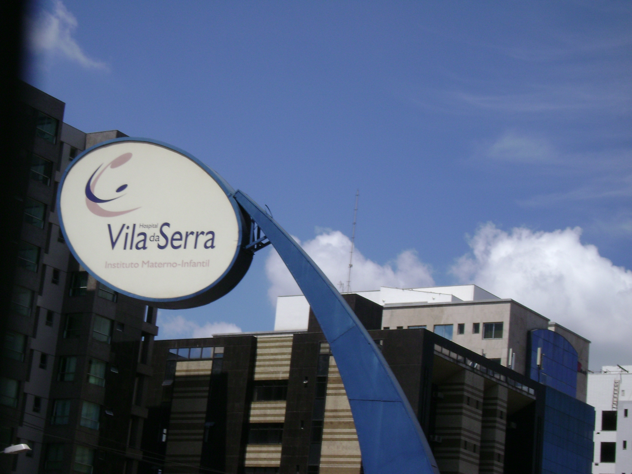 Nova Lima (MG), Brazil Signage of Hospital Vila da Serra Placa de hospital na Vila da Serra